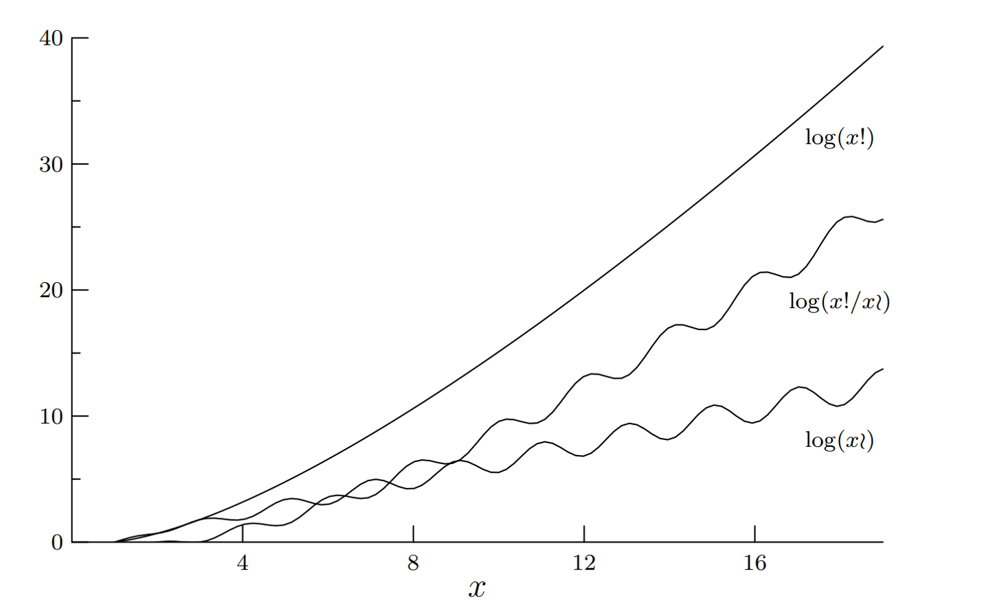 График функции качающегося факториала в сравнении с функцией факториала на логарифмической шкале.